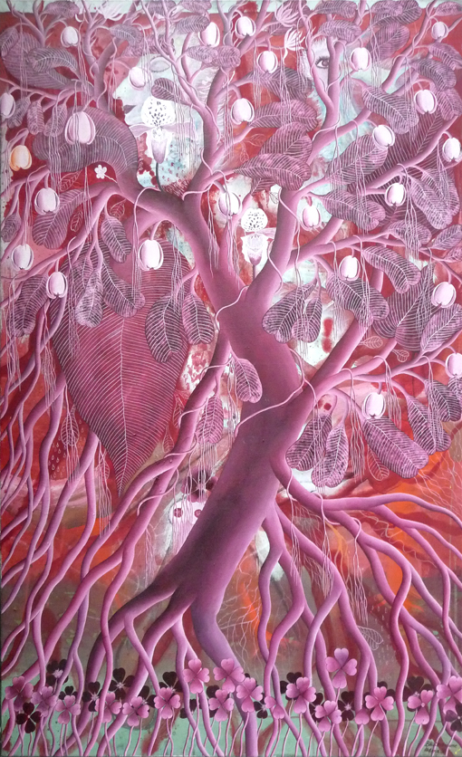 Die Aufnahme entstand am 15.9.2015 im Berliner Atelier von Helma.